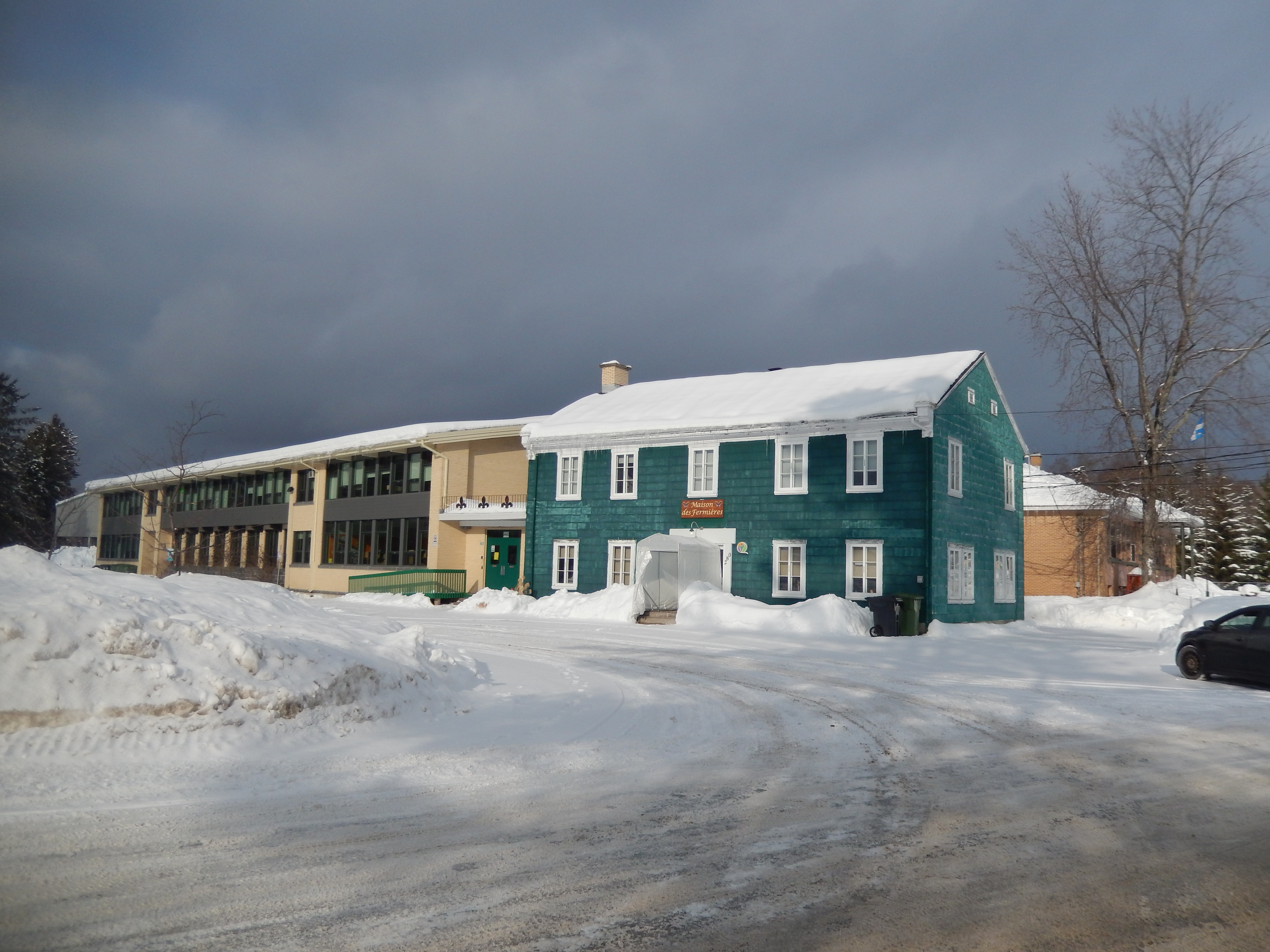 Ancien couvent de Saint-Léonard en janvier 2020.